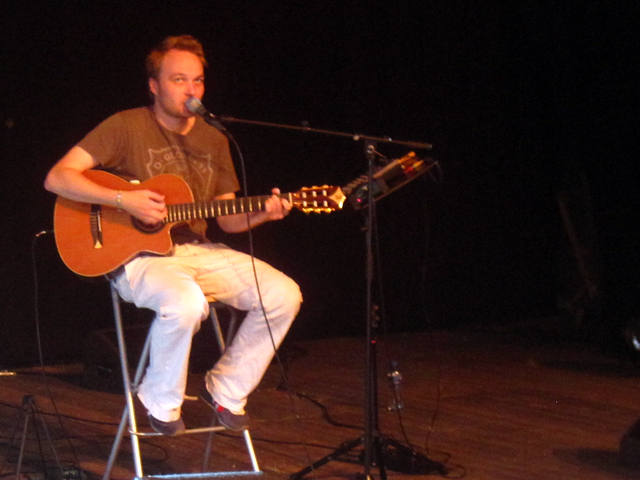 Arjen Henrik Lubach (Lutjegast, 22 oktober 1979) is schrijver, cabaretier en televisiepresentator. -- Optreden op Zwarte Cross met het Monica da Silva Trio